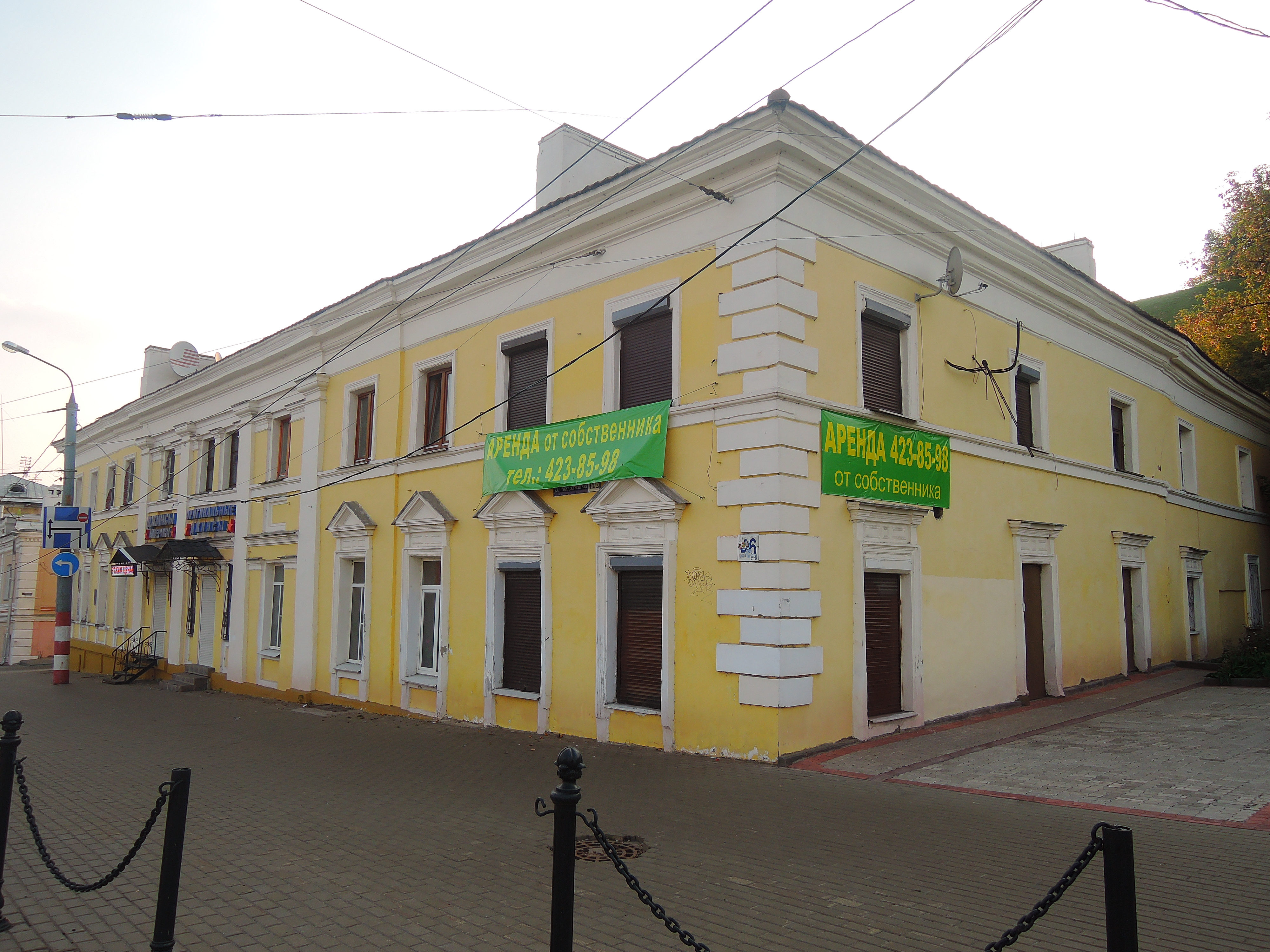 Доходный дом князя Абамелек-Лазарева: улица Рождественская, 46, Нижний Новгород, Нижегородская область